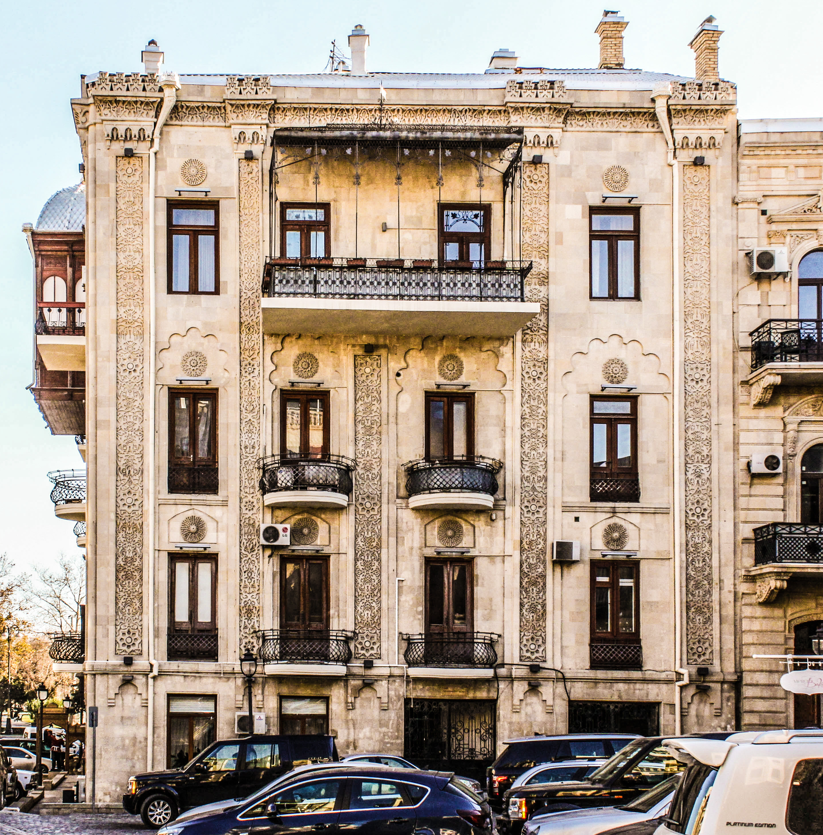 Yaşayış evi, V.Məmmədov küçəsi, 24